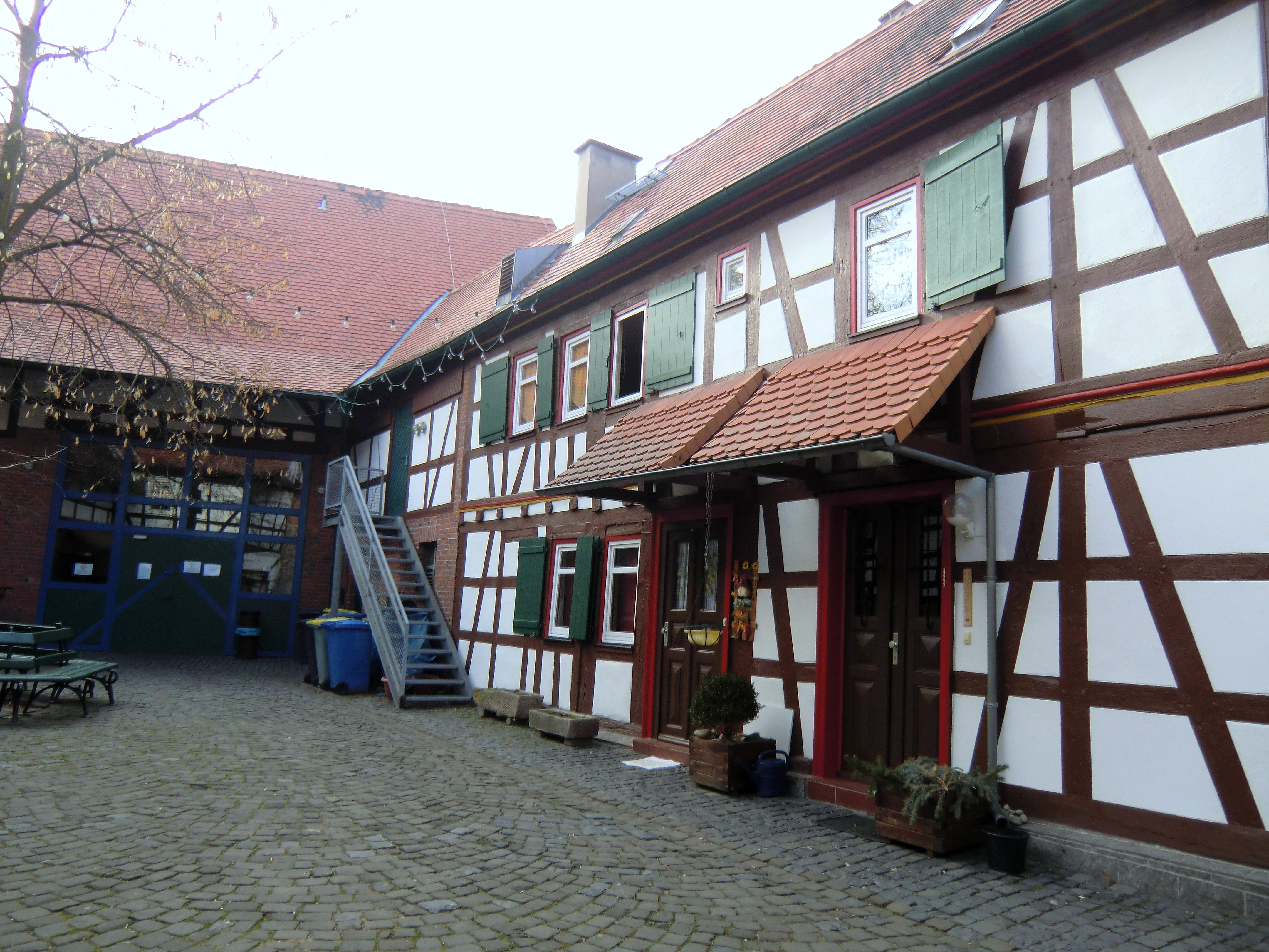 Das neue Spielhaus in Bruchköbel. Ehemals für Beratungen, Gerichtsverhandlungen und bis heute für Veranstaltungen genutzttes Gemeindehaus.This is a photograph of an architectural monument.